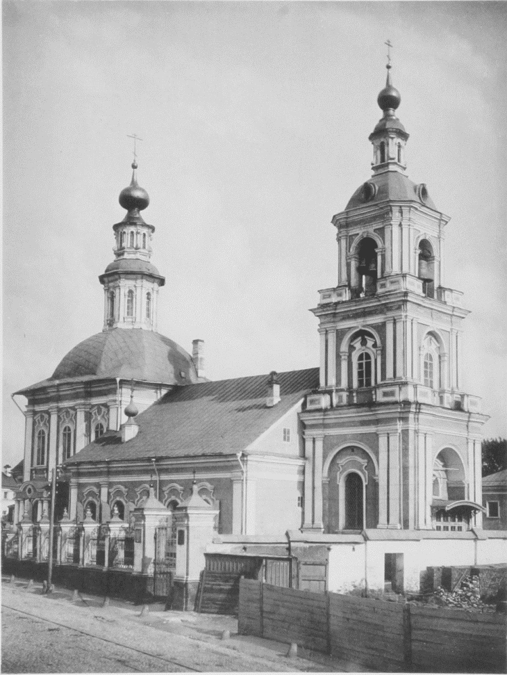 Храм святителя Алексия, митрополита Московского, в Рогожской слободе